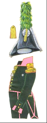 Командующий милицией губернии — знаками различия были: эполет на левом плече и погон на правом